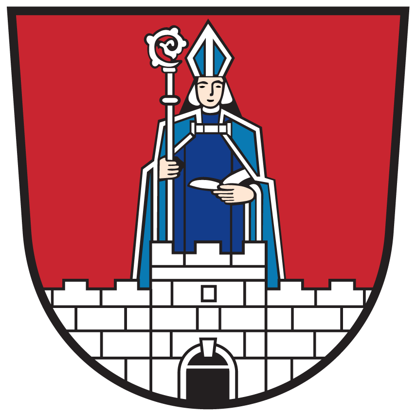 Wappen von Peternion